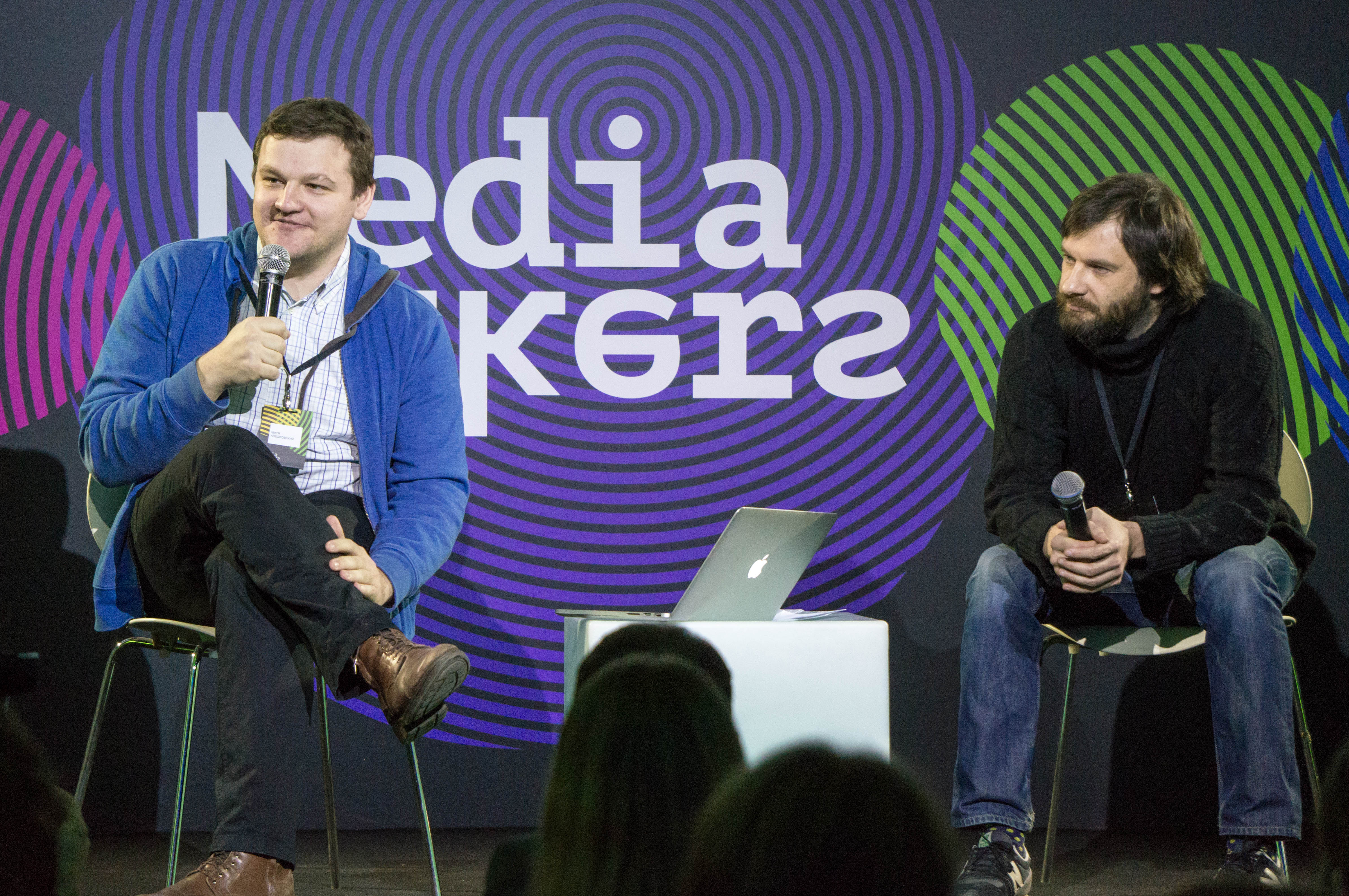 Митя Алешковский и Андрей Лошак на конференции MediaMakers 2015